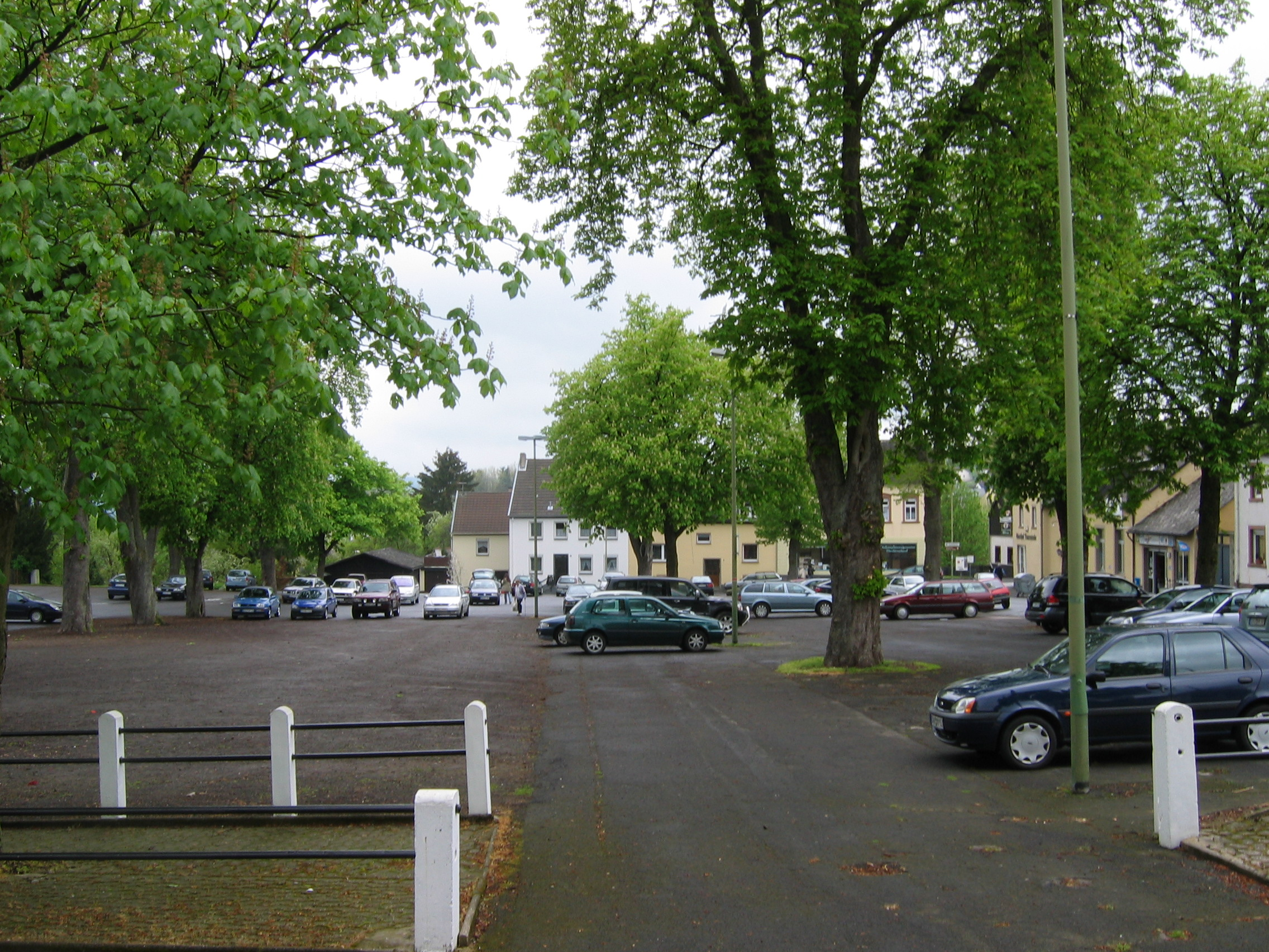 Marktplatz von Hillesheim (Eifel)